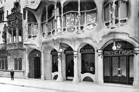 Façana casa Batlló poc després de la seva construcció amb la botiga de fotografia de Pathe Freres a la planta baixa (1905-1907)